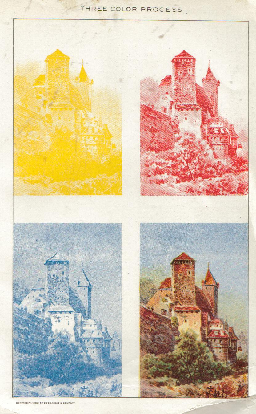 Painting